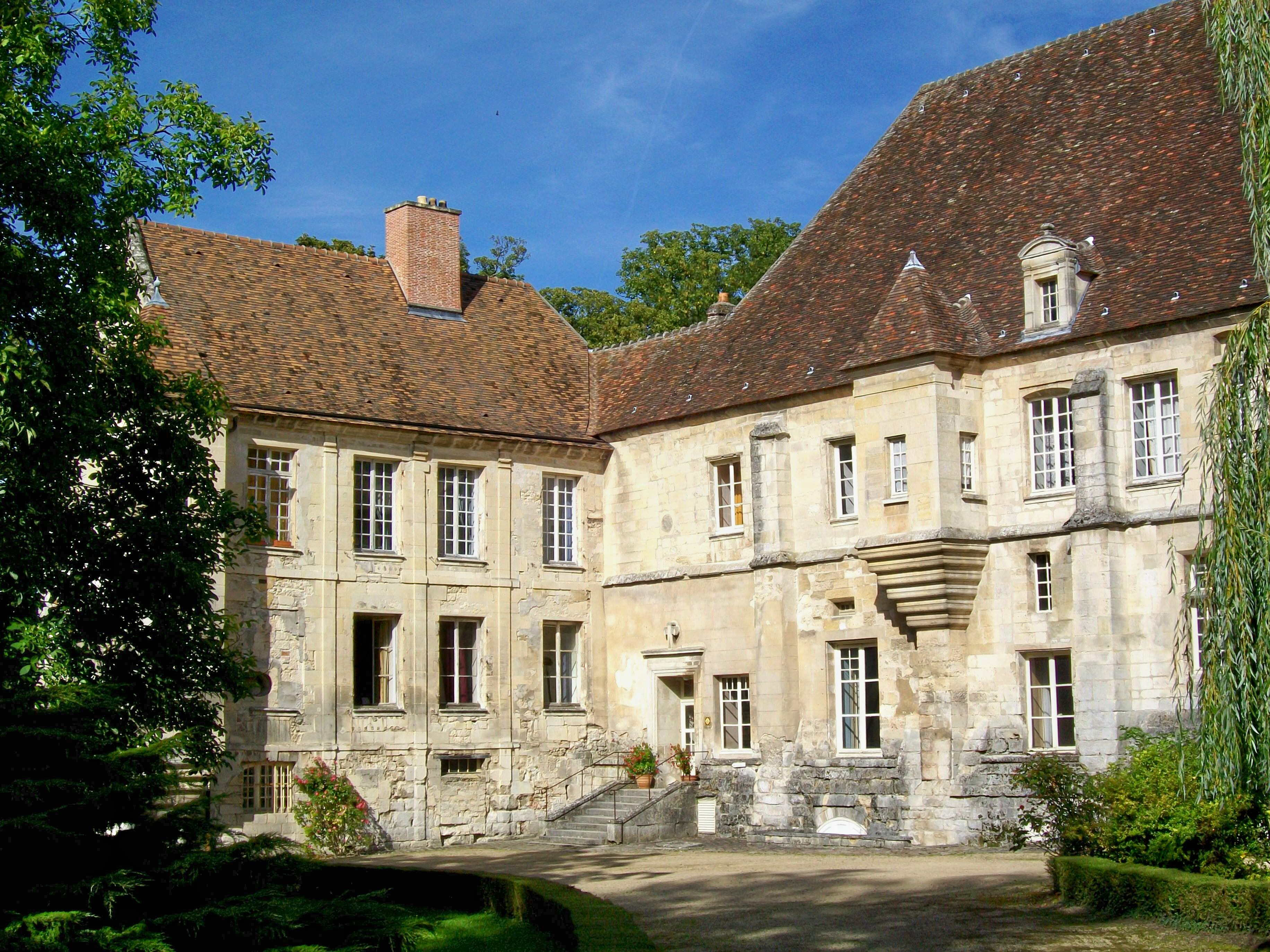 L'entrée de l'ancien palais abbatial, à l'angle nord-ouest du complexe.